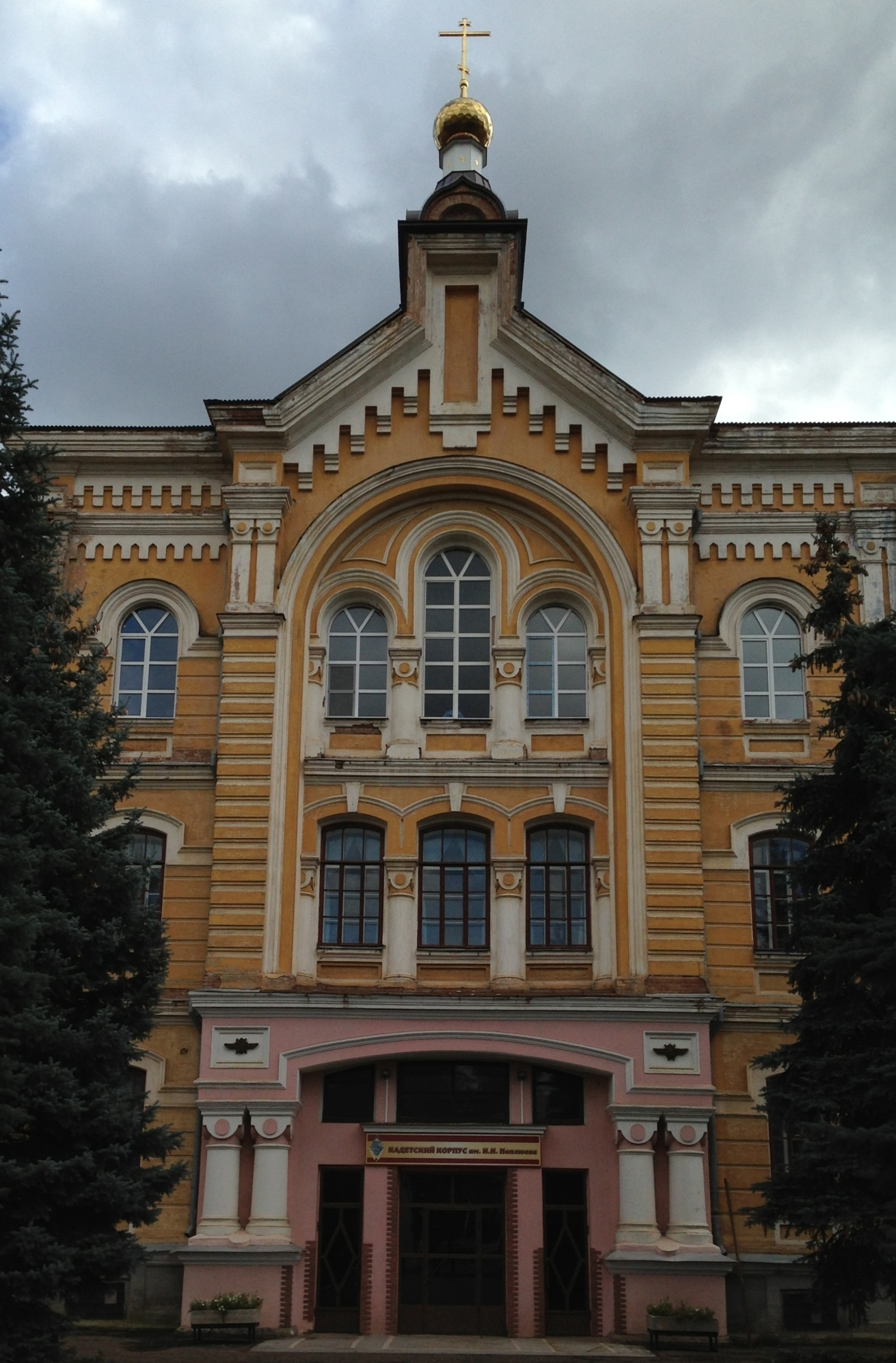 Училище епархиальное (Оренбургская область, Оренбург, улица Челюскинцев, 17)